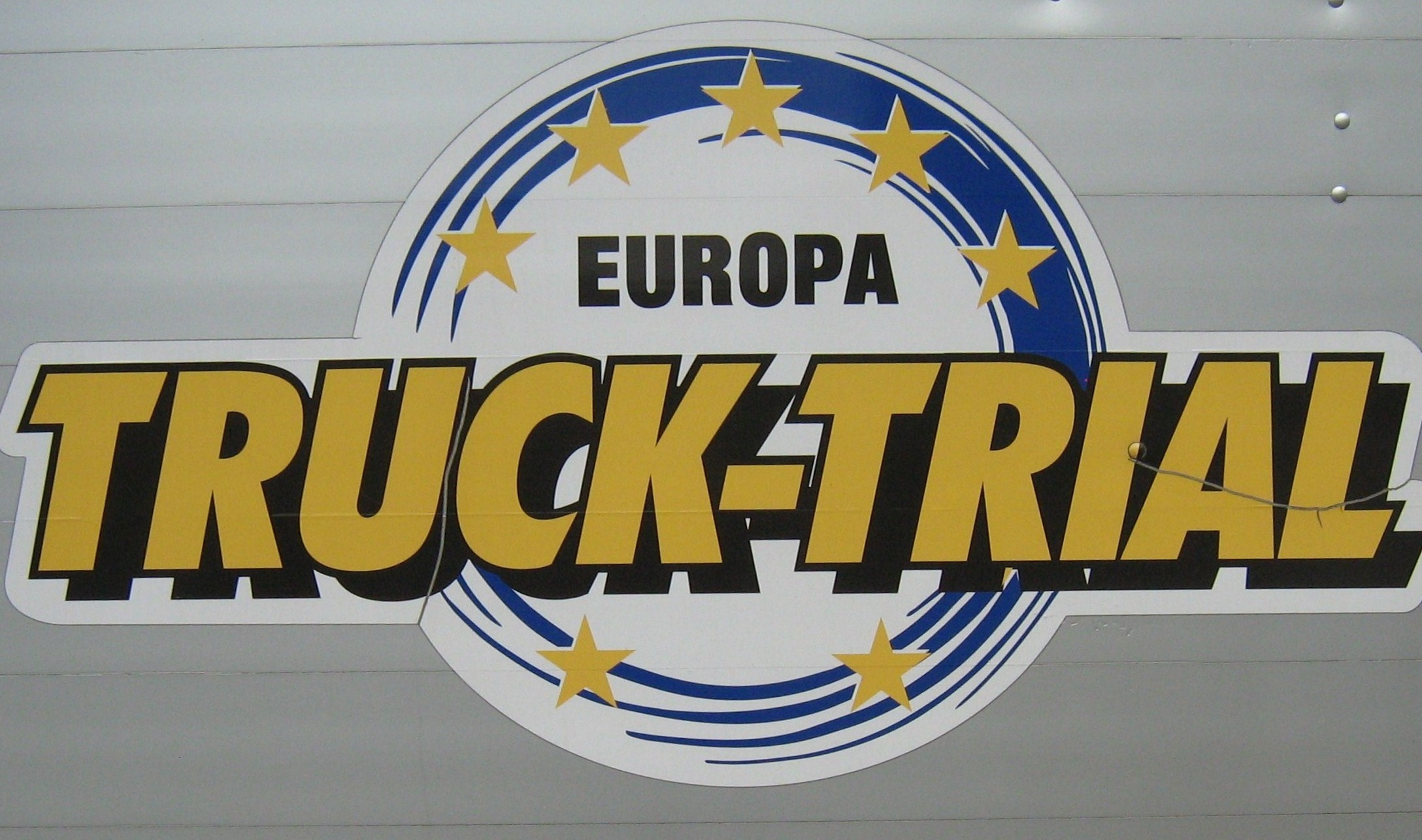 Schild Truck Trial